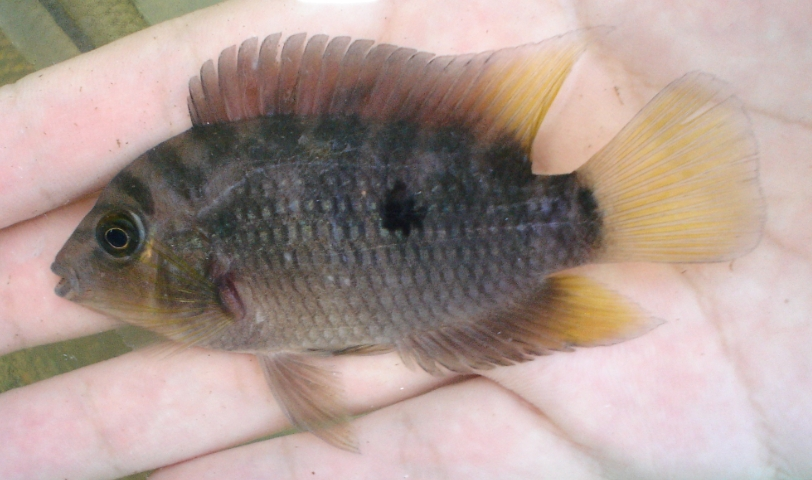 Australoheros scitulus